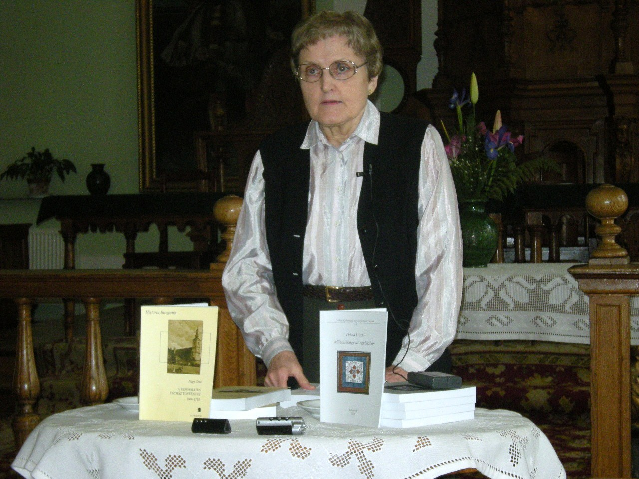 Könyvbemutató Kolozsváron: Nagy Géza: A református egyház története 1608-1715.